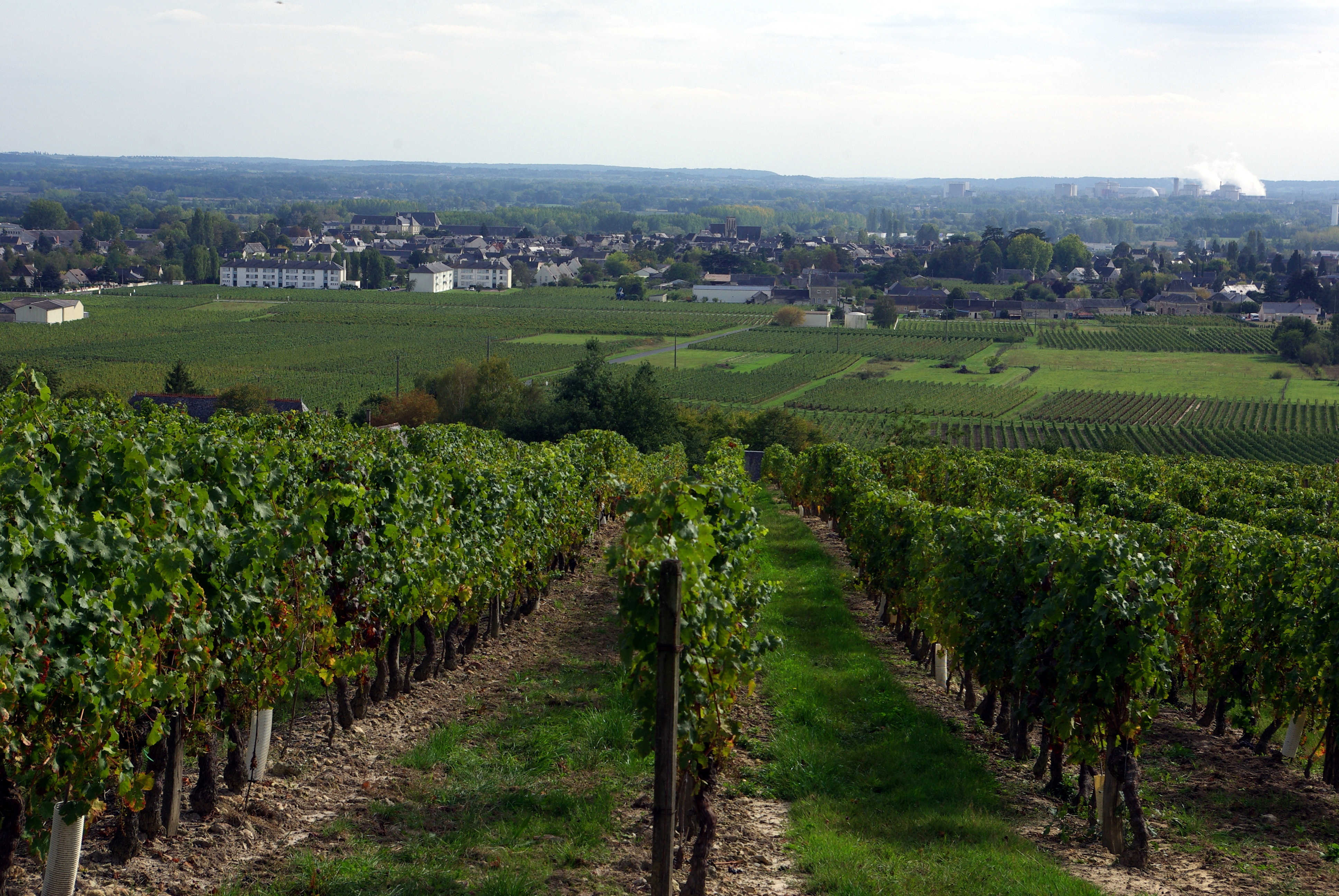 Bourgueil depuis le Moulin Bleu. Dans le fond on distingue la centrale nucléaire de Chinon.